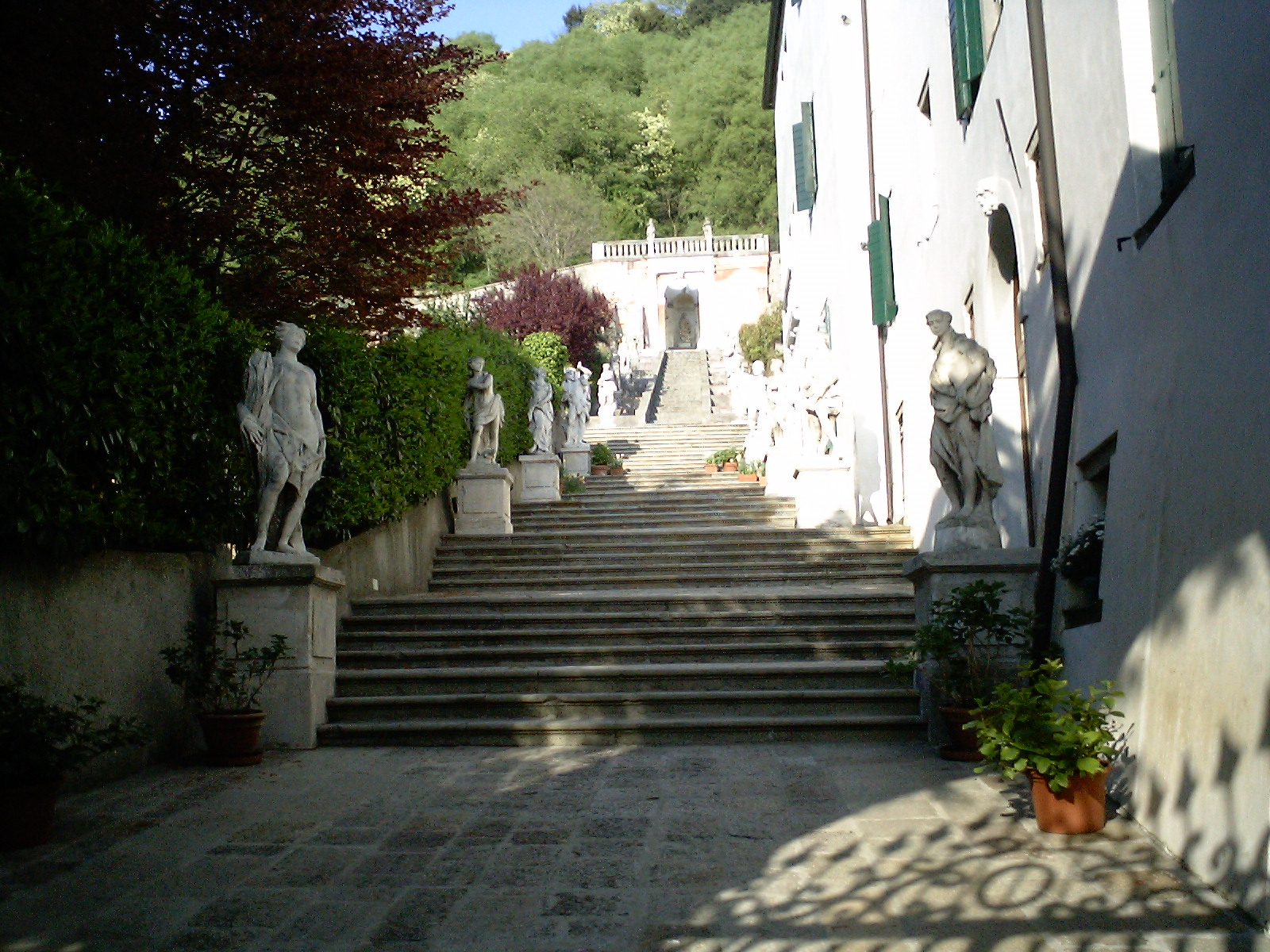 Cà Nani Mocenigo in Monselice